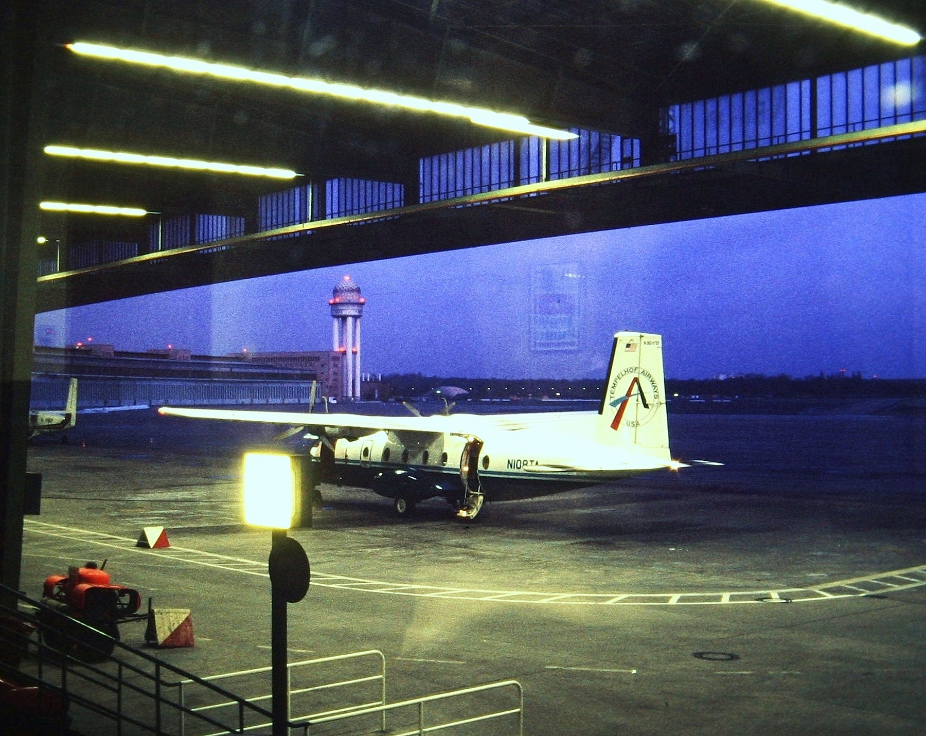 Tempelhof Airways, Aérospatiale N 262, Flughafen Berlin-Tempelhof, 1988